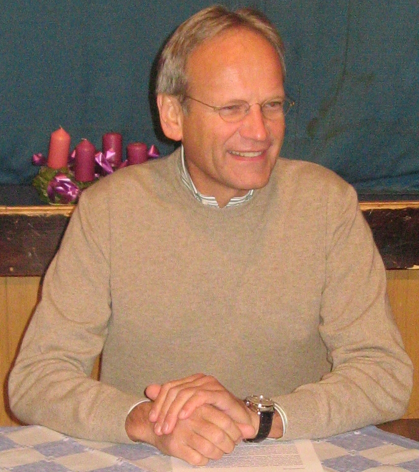 Psychotherapeut Arnold Mettnitzer beim Katholischen Bildungswerk in der Pfarre Breitenfeld, 1080 Wien.